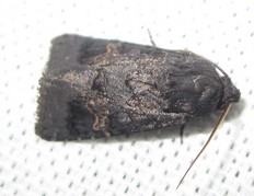 Melanephia brunneiventris